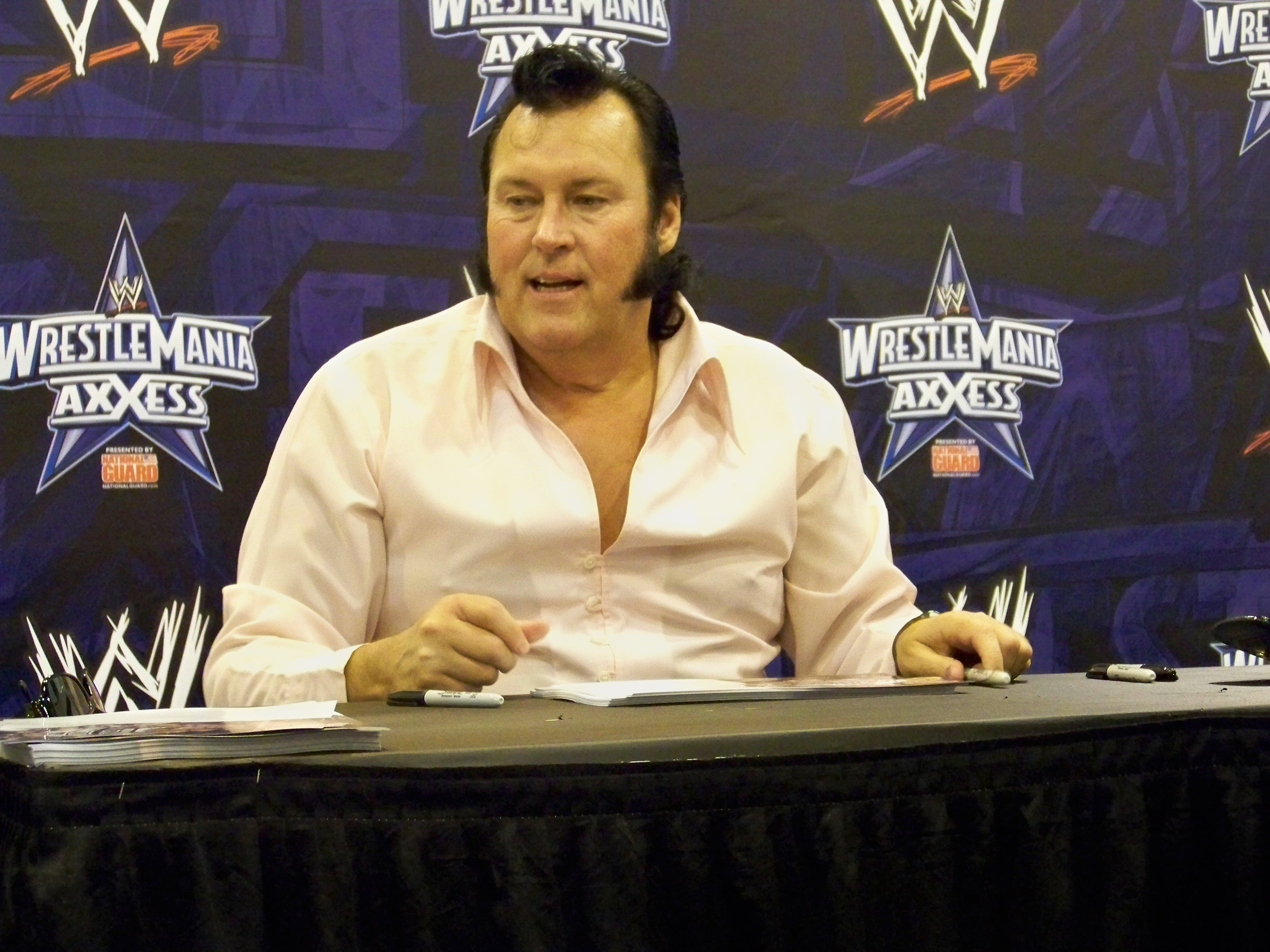 Dimanche matin a commencé avec notre 2eme fan axxess